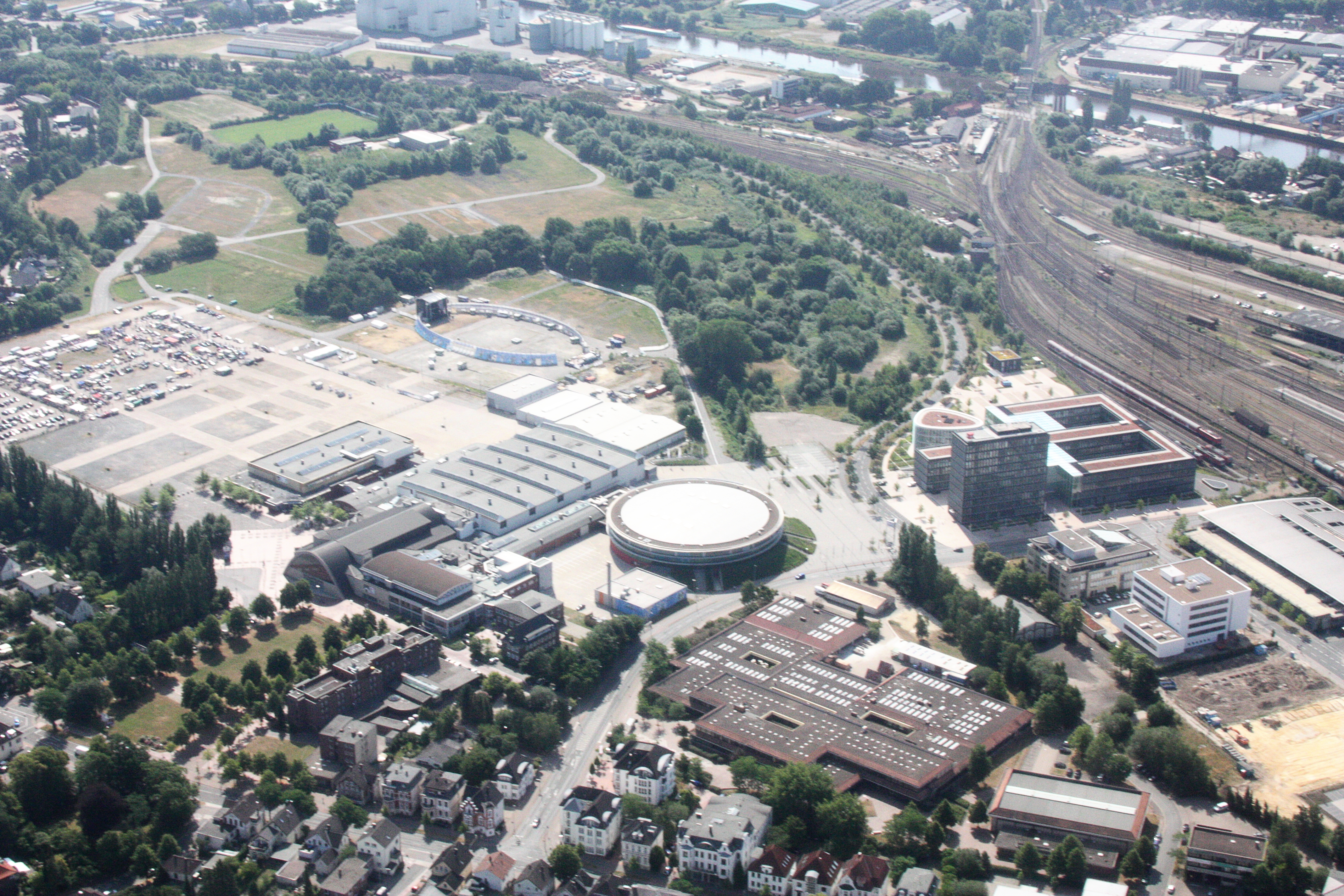 Luftaufnahmen Oldenburg (Oldenburg), mit Weiterflug nach Westen; 1500 Fuß Flughöhe; Juli 2010; Originalfoto bearbeitet: Tonwertkorrektur und Bild geschärft mit Hochpassfilter